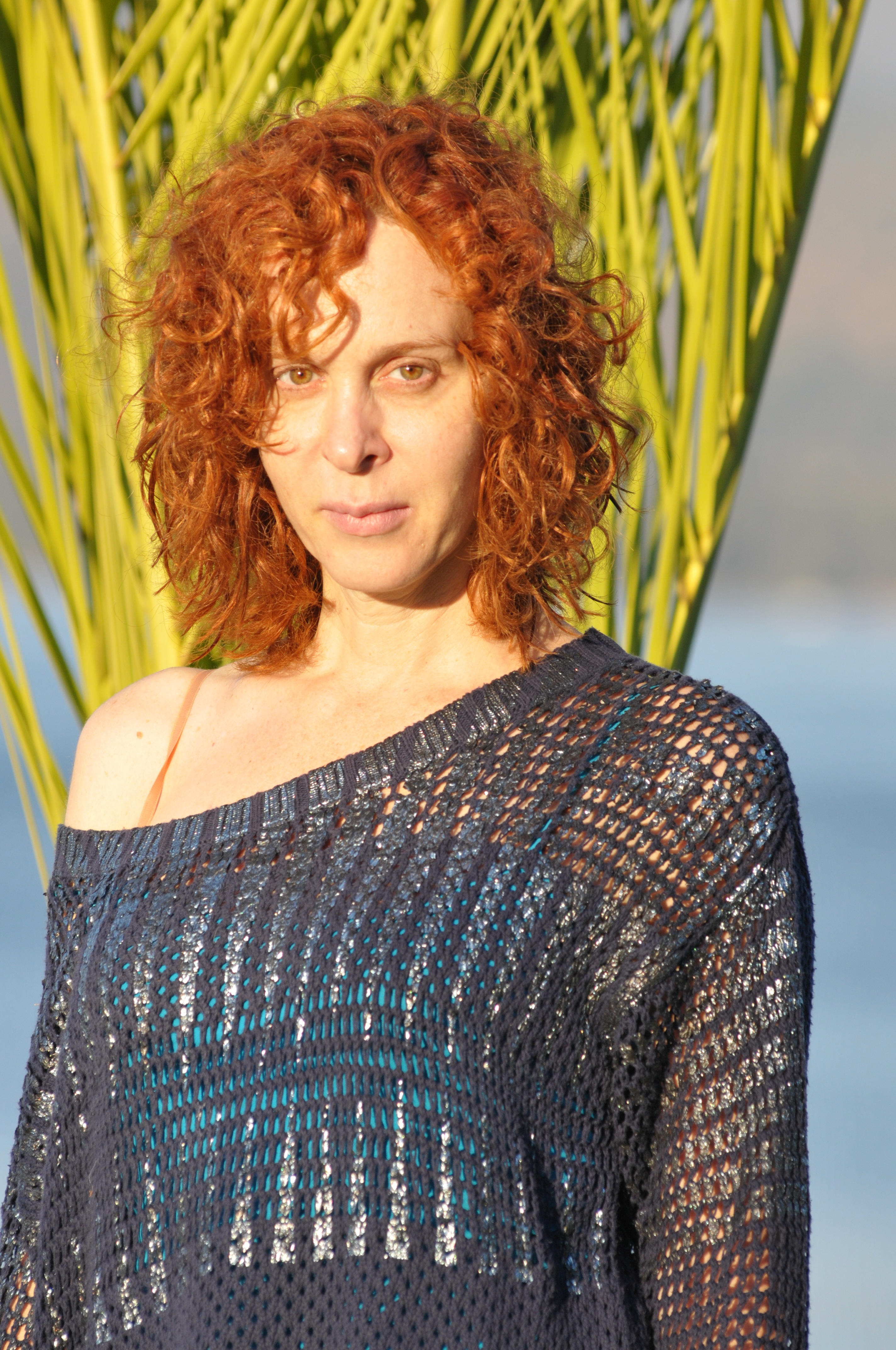 Foto Vane Miller 2015